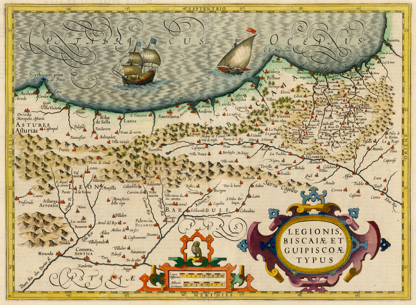 “Legionis Biscaiae eta Guipuscoae typus”, Mercator (1630). Orteliusen maparen (1603) garai berekoa da, eta ezaugarri bertsuak ditu egiteko moduari eta ematen duen informazioari dagokienez.